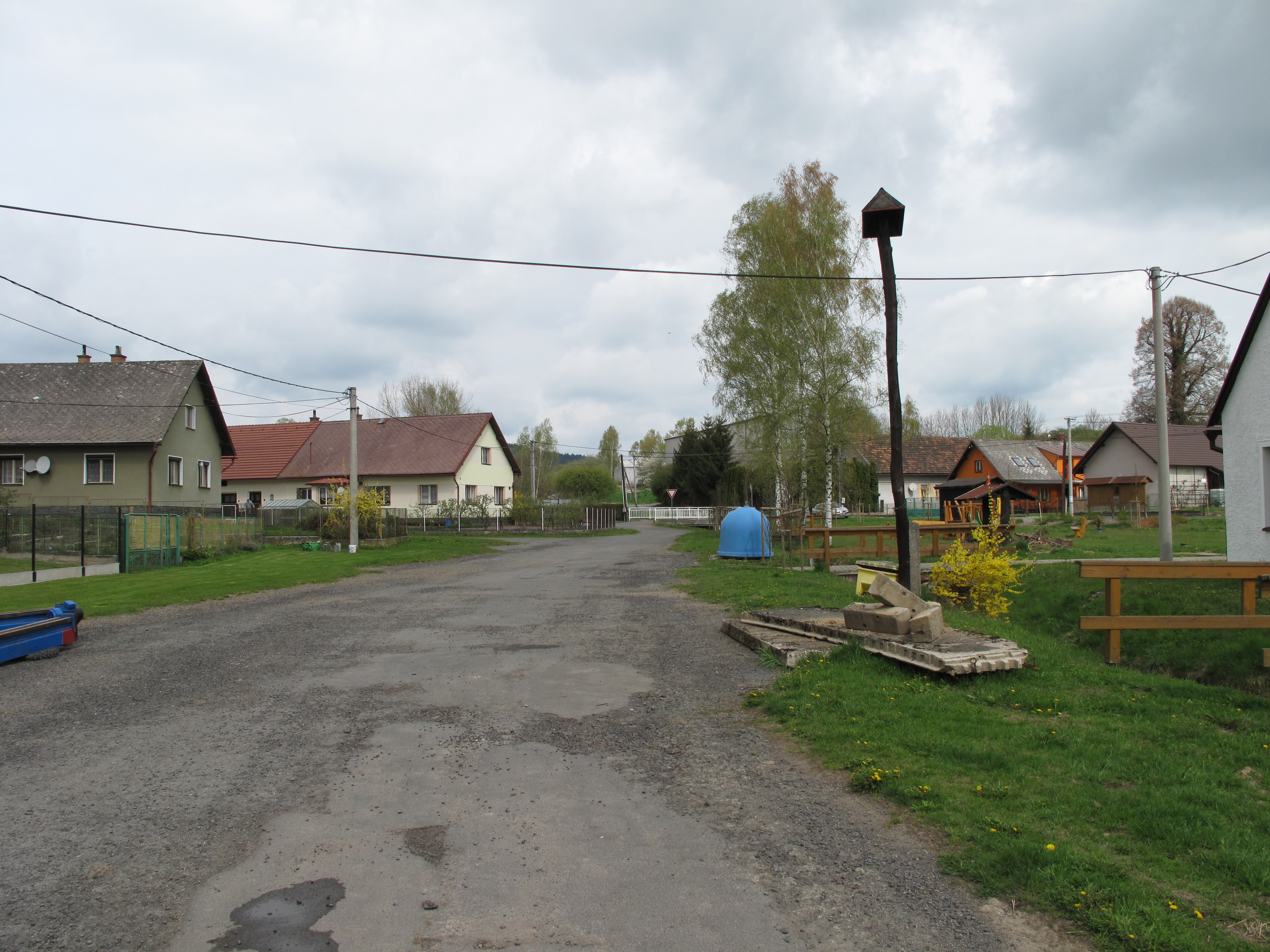 Rudoltice (Černíkov). Okres Klatovy, Česká republika.